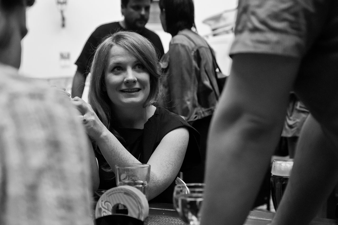 Měsíc autorského čtení 2014, 1.7.2014 v Brně